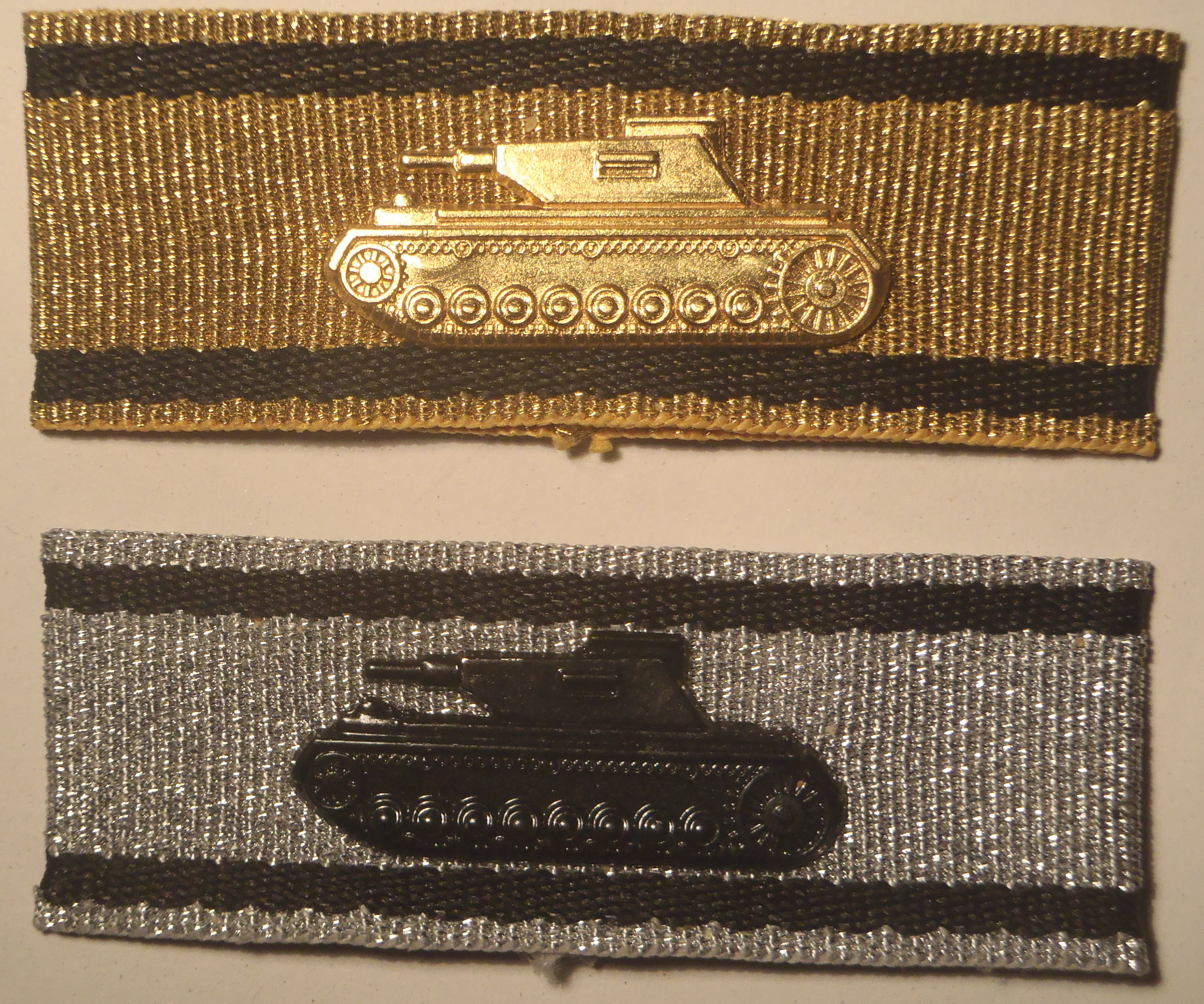 Abzeichen der deutsche Wehrmacht, hier Sonderabzeichen für das Niederkämpfen von Panzerkampfwagen durch Einzelkämpfer (kurz: Panzervernichtungsabzeichen), in Gold und Silber.